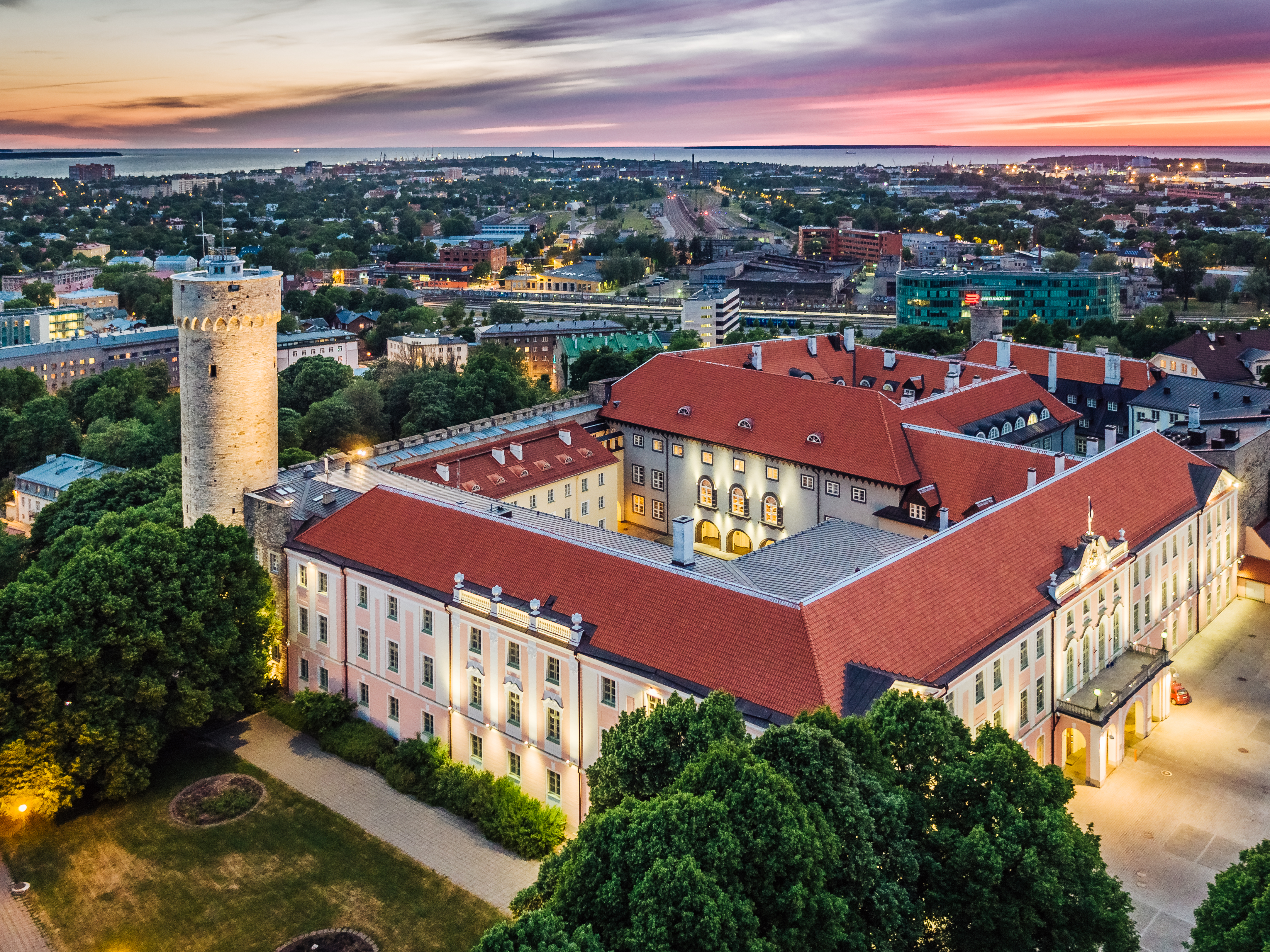 Riigikogu hoone.